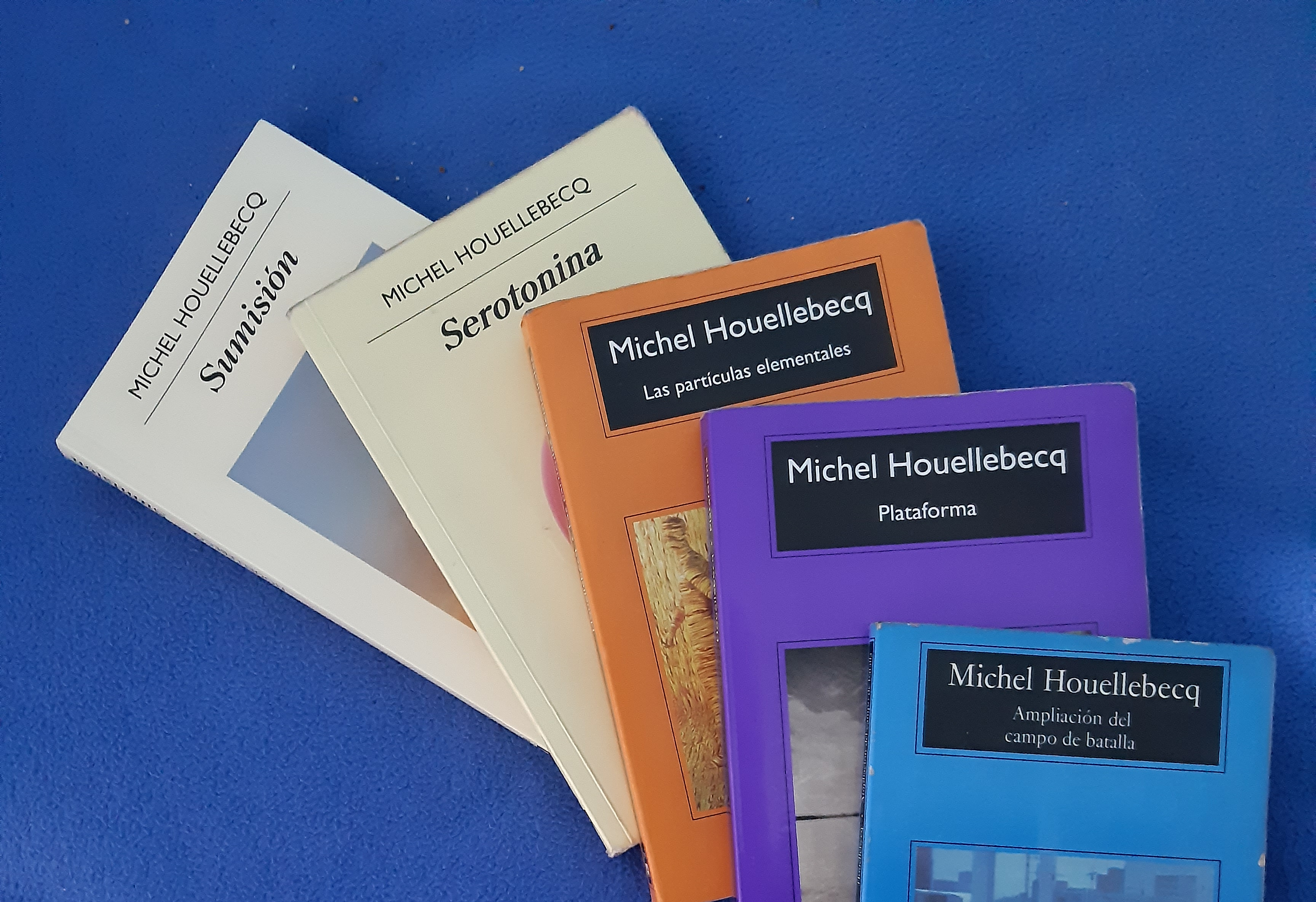 Libros de Houellebecq